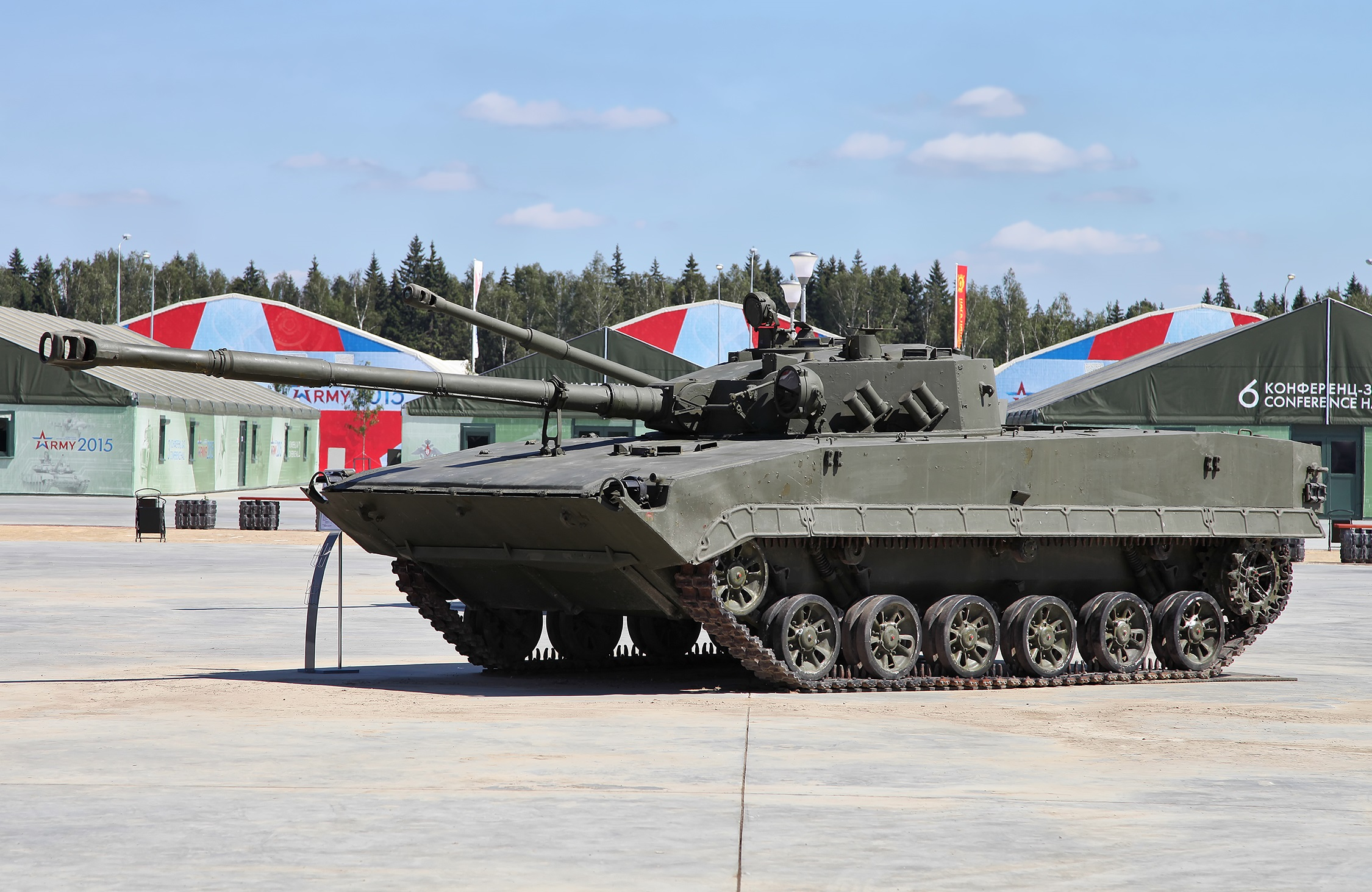 Опытный лёгкий танк Объект 685 в экспозиции парка "Патриот"